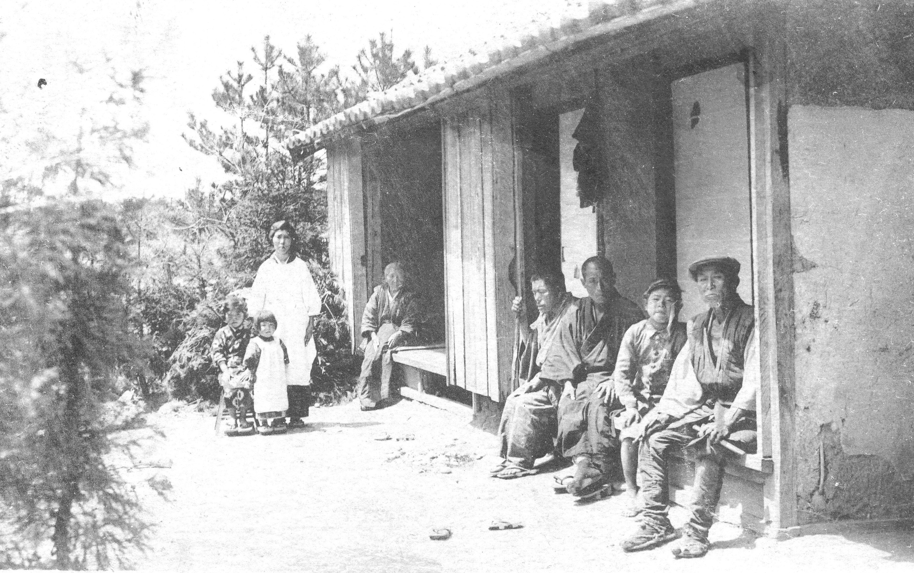 道端や橋の下に人が捨てられているのが日常の時代だった。 救済所は、捨て子や老病者を多く収容。ここで成人まで育った孤児たちも数え切れない。